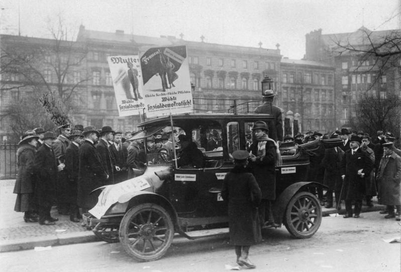 Wahlen zur Nationalversammlung am 19. Jan. 1919. Wahlpropaganda-Aktion der Sozialdemokraten in Berlin.